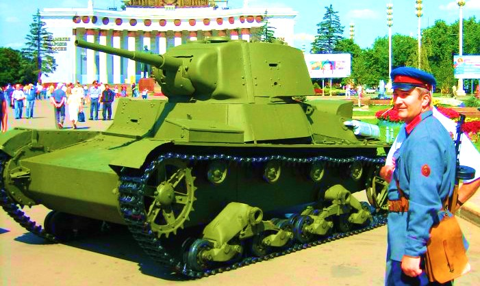 T-26 tank in Russia.